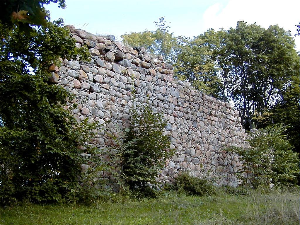 Durbes pilsdrupas 1999-09-03